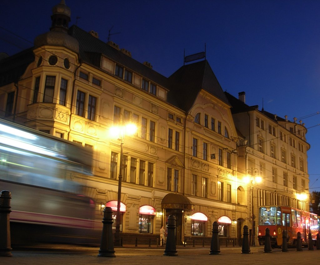 Kamienica ul. Jagiellońska 4 w Bydgoszczy